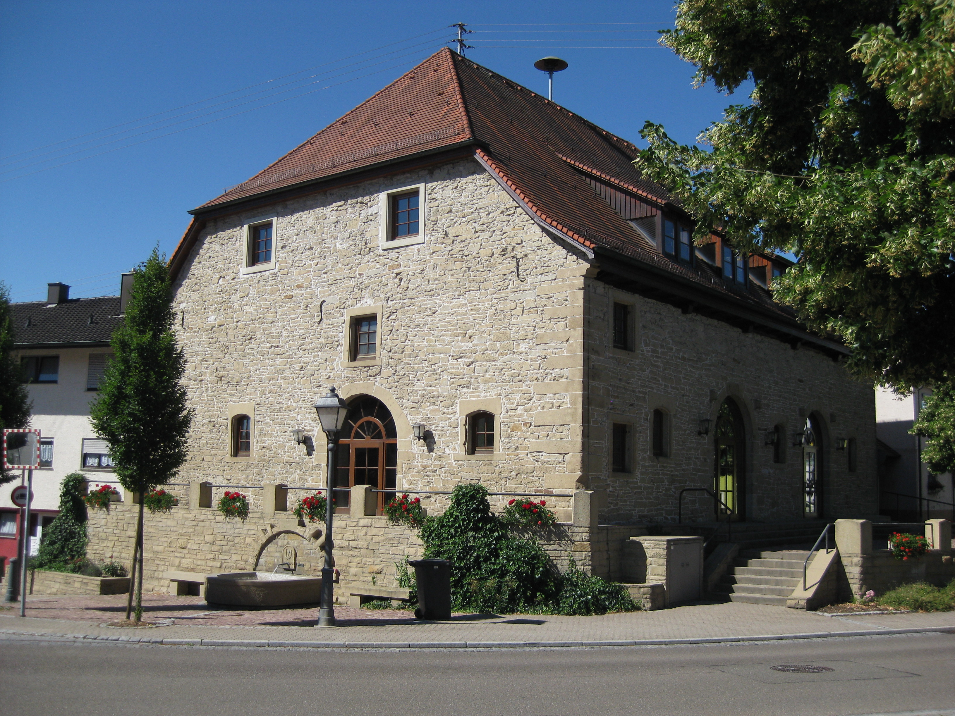 Bürgerhaus Kelter, Kelterplatz 1, 71563 Affalterbach